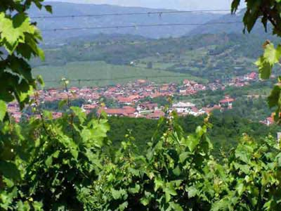 Власотинце, брана на акумулацији